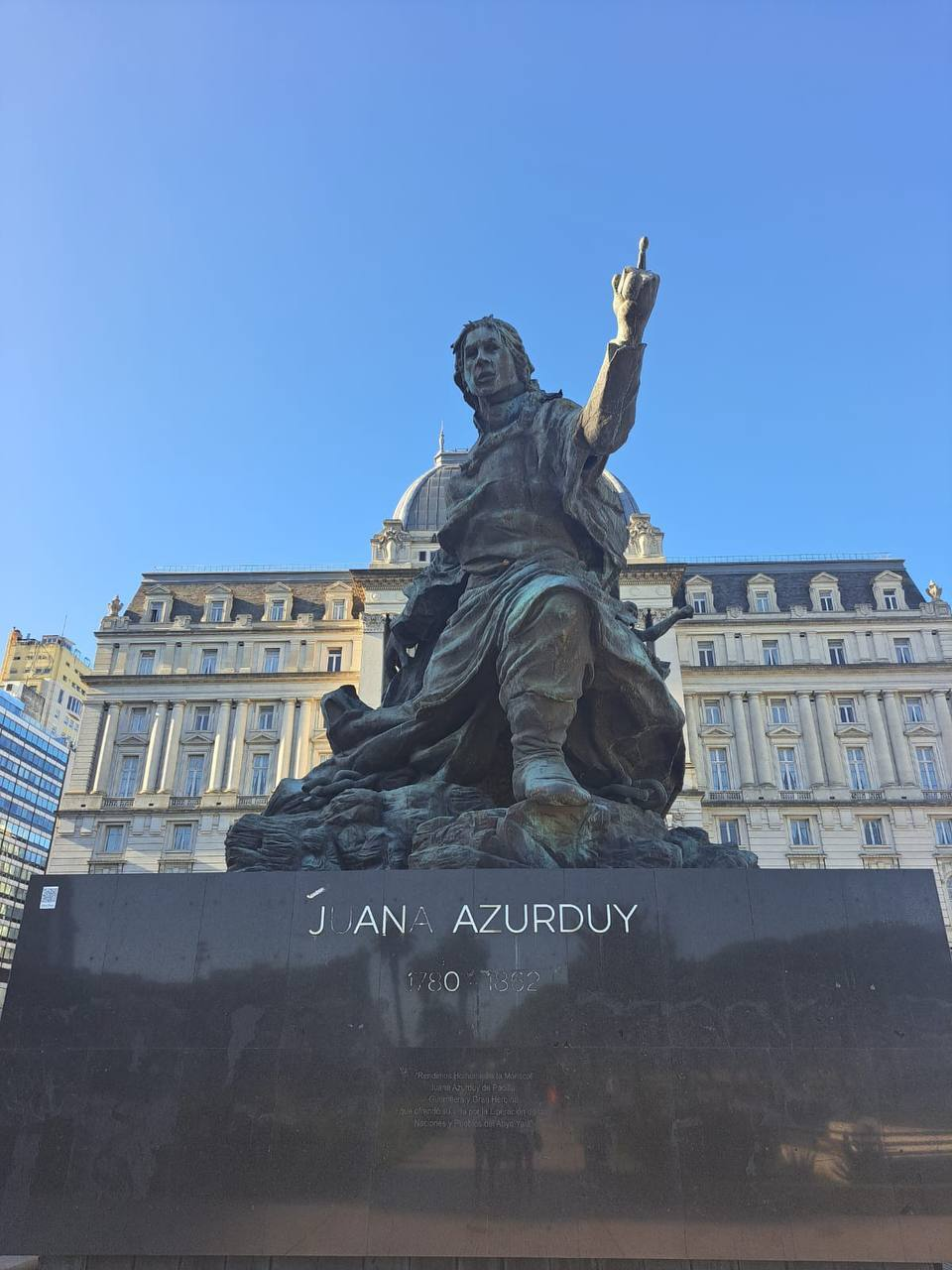 Emblema